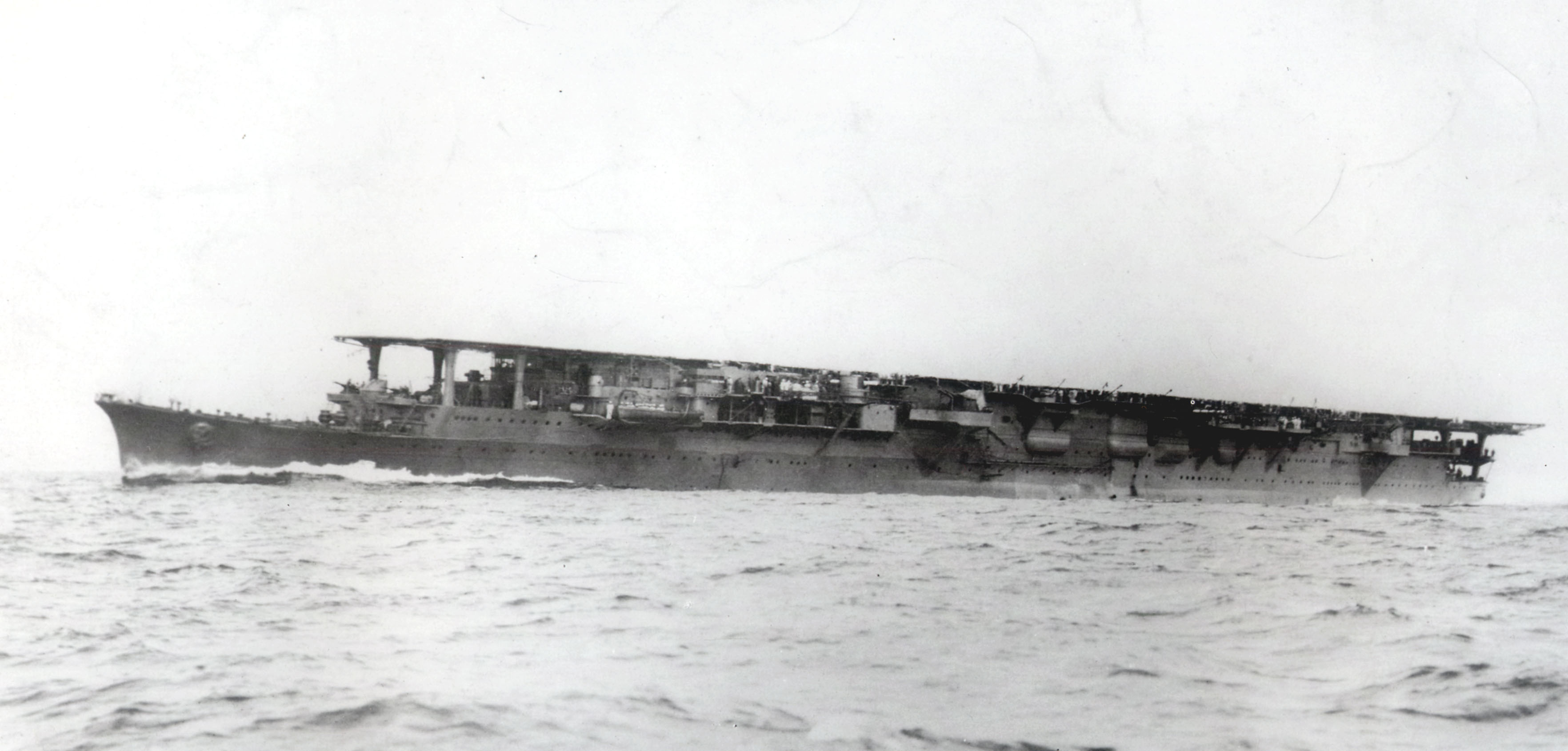 日本海軍航空母艦瑞鳳型「龍鳳」東京湾内にて公試中の写真。